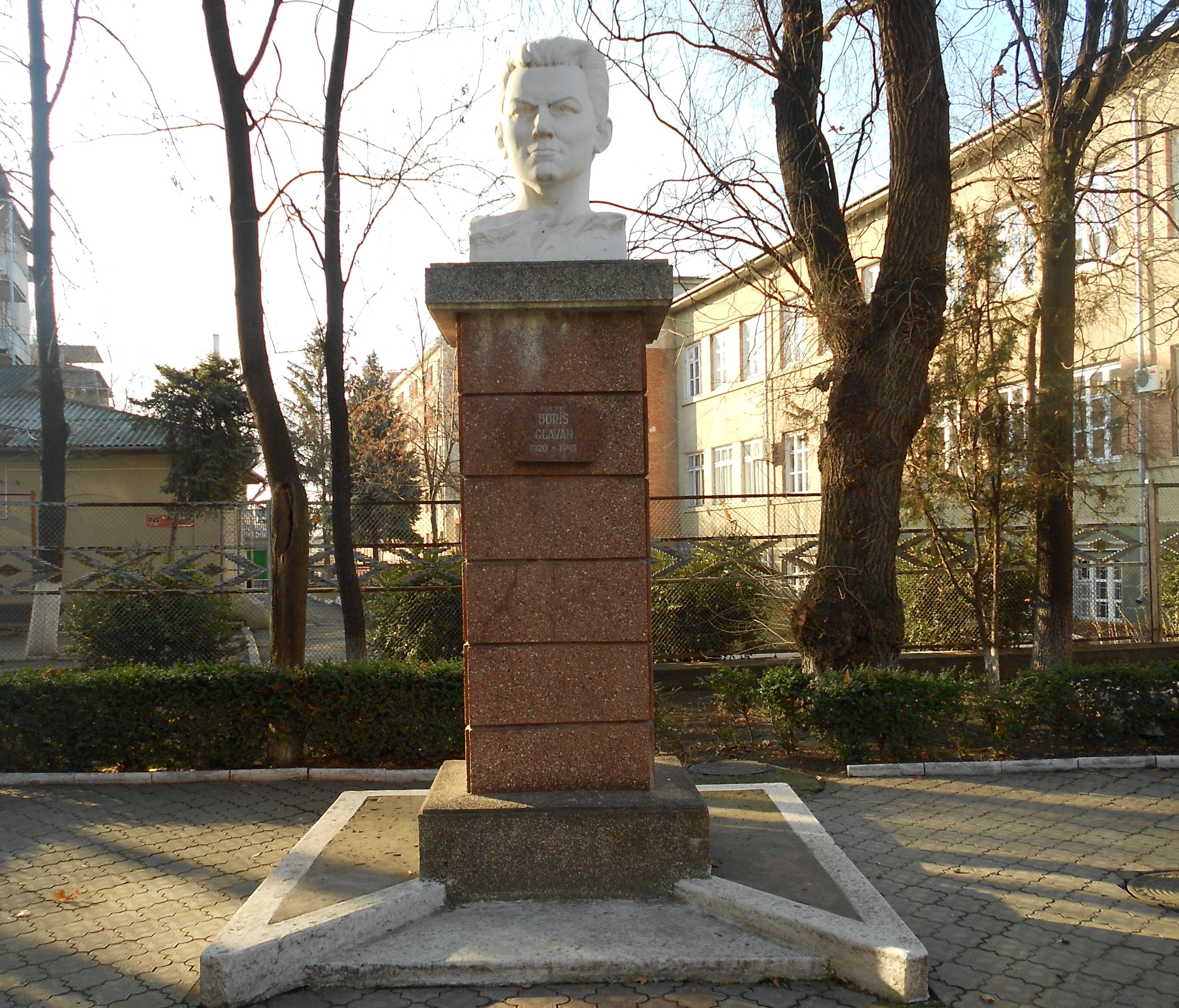 Monument lui Boris Glavan